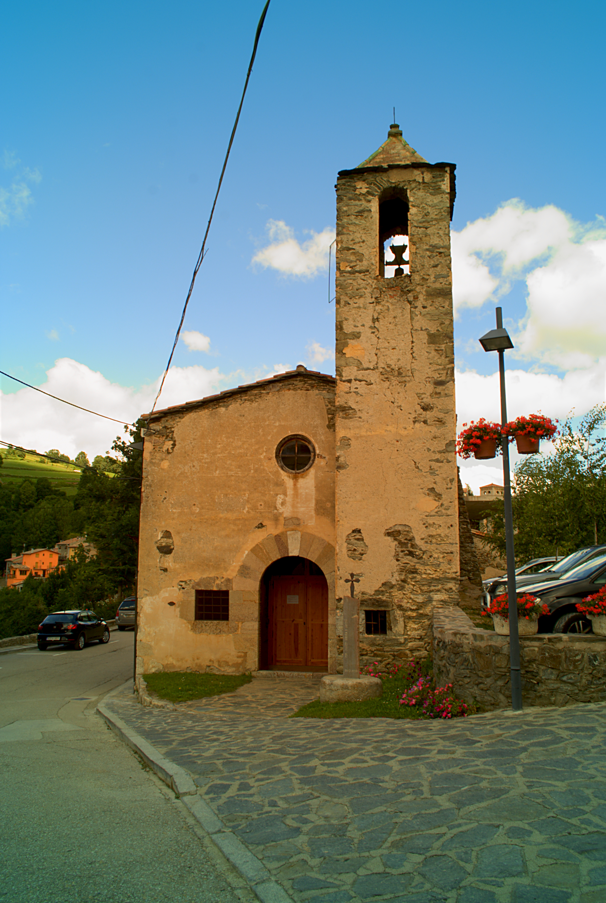 Église Saint-Sébastien, Molló (Ripollès, Catalogne, Espagne)